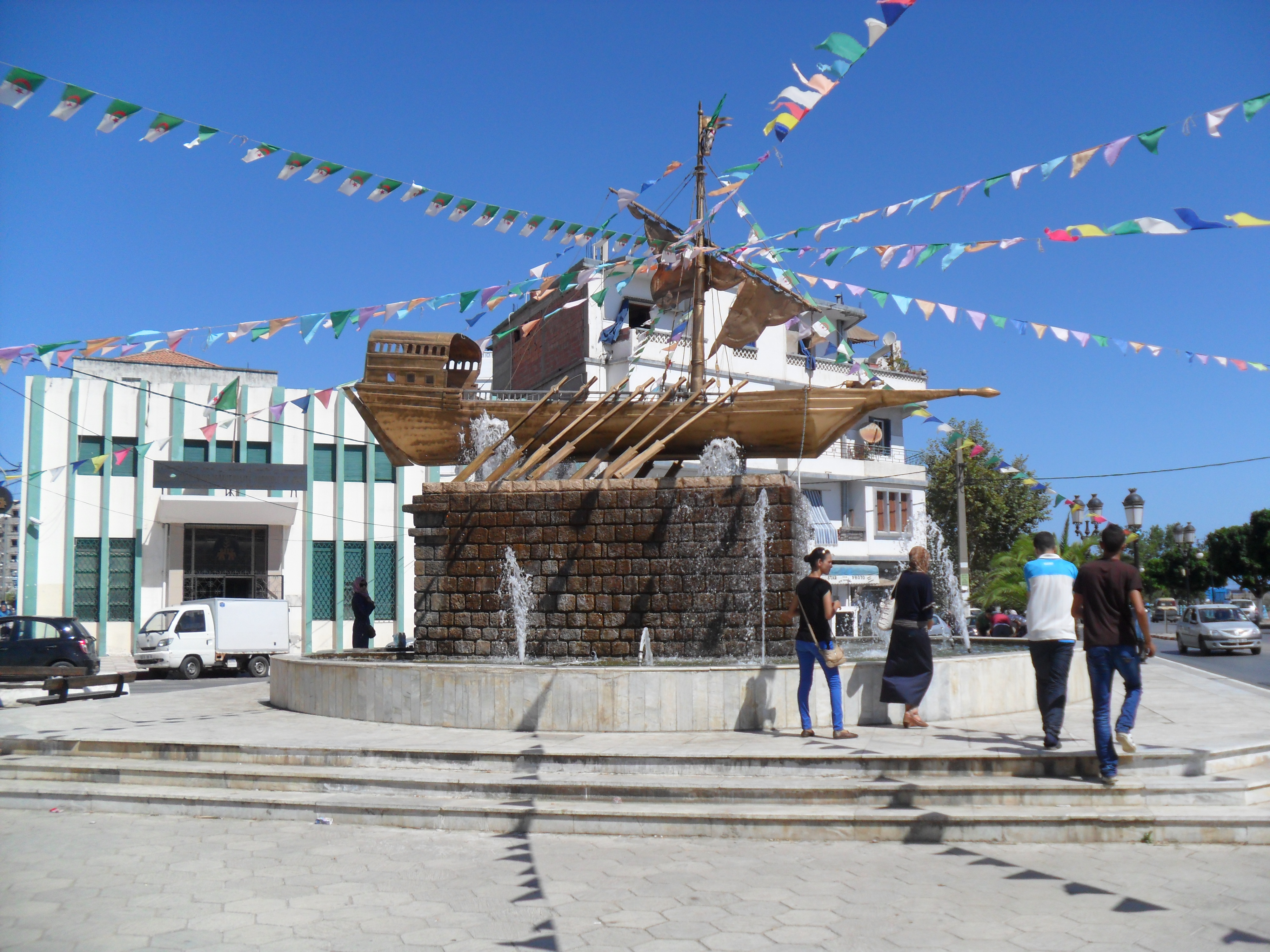 Le bateau de baba Aroudj, Jijel (Algérie)